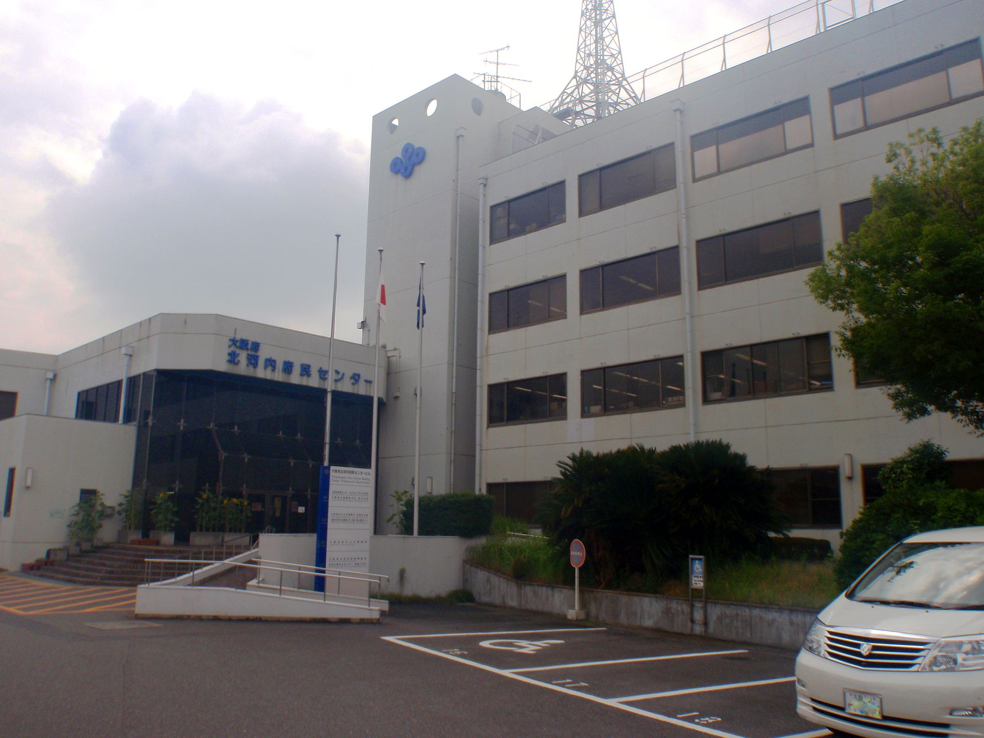 大阪北河内府民センター